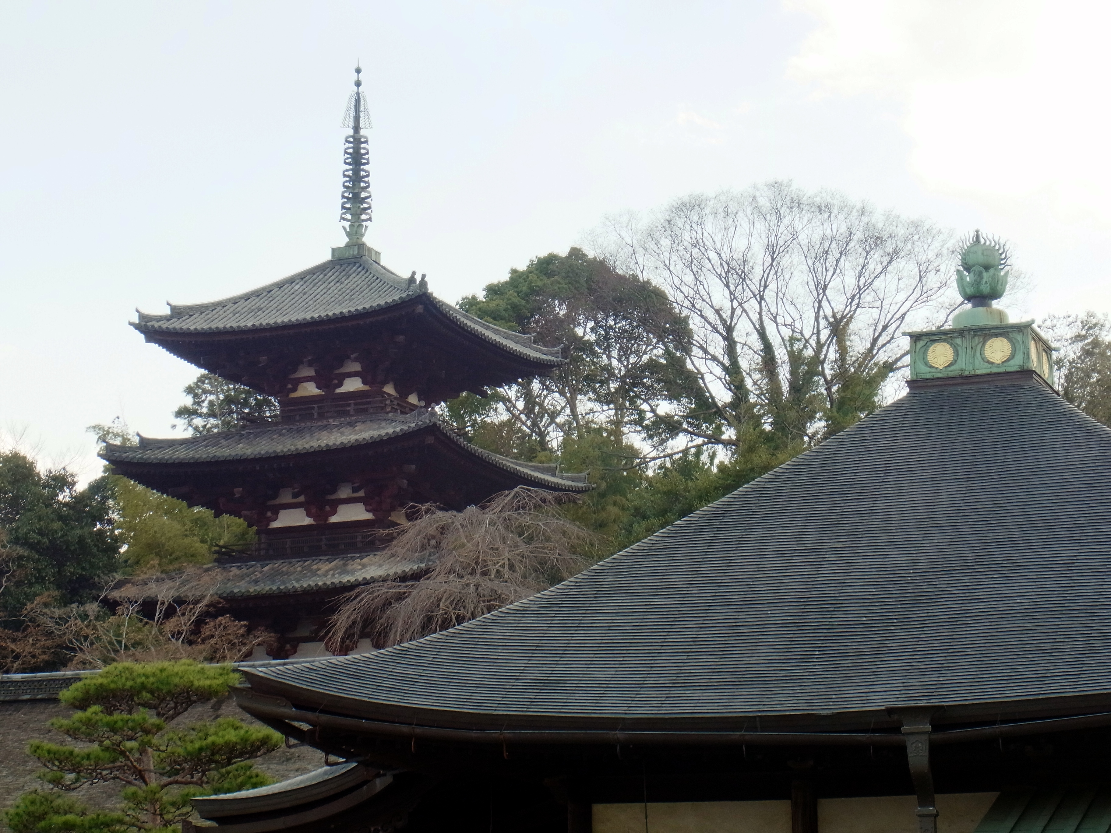 當麻寺にて Taimadera 2011.12.12